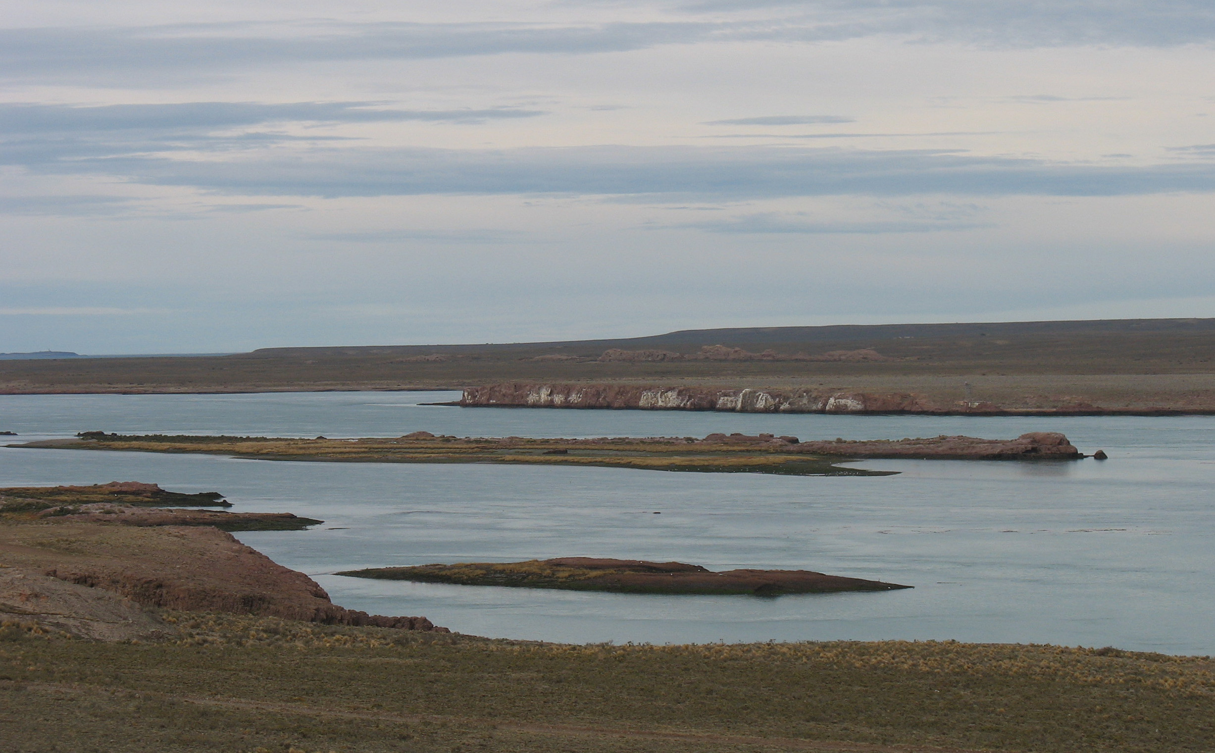 Vista de la isla de los Leones, en la ría Deseado (Santa Cruz, Patagonia Argentina)